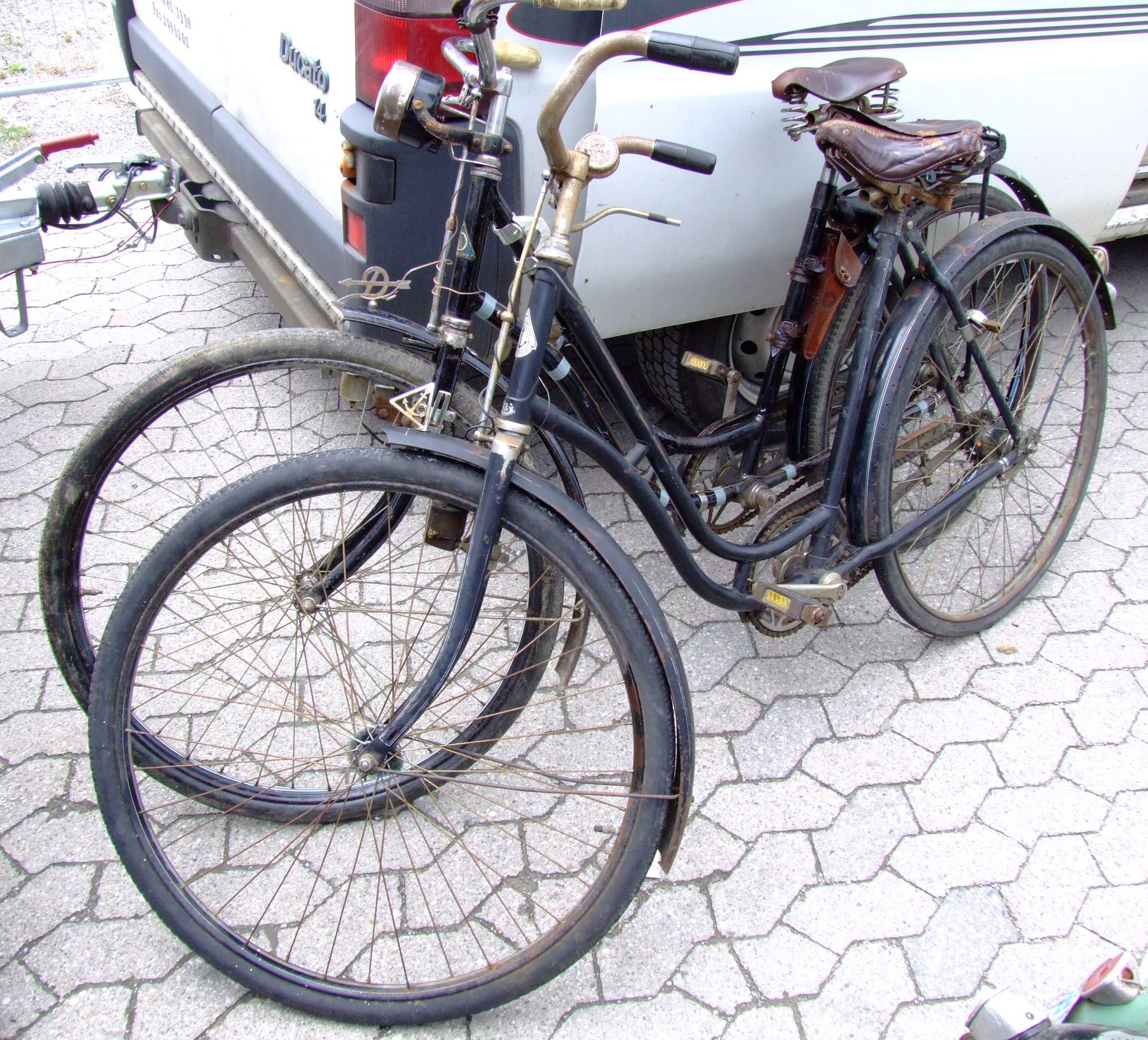 Quelle: selbst fotografiert, 07/2007 Fotograf: Späth Chr.